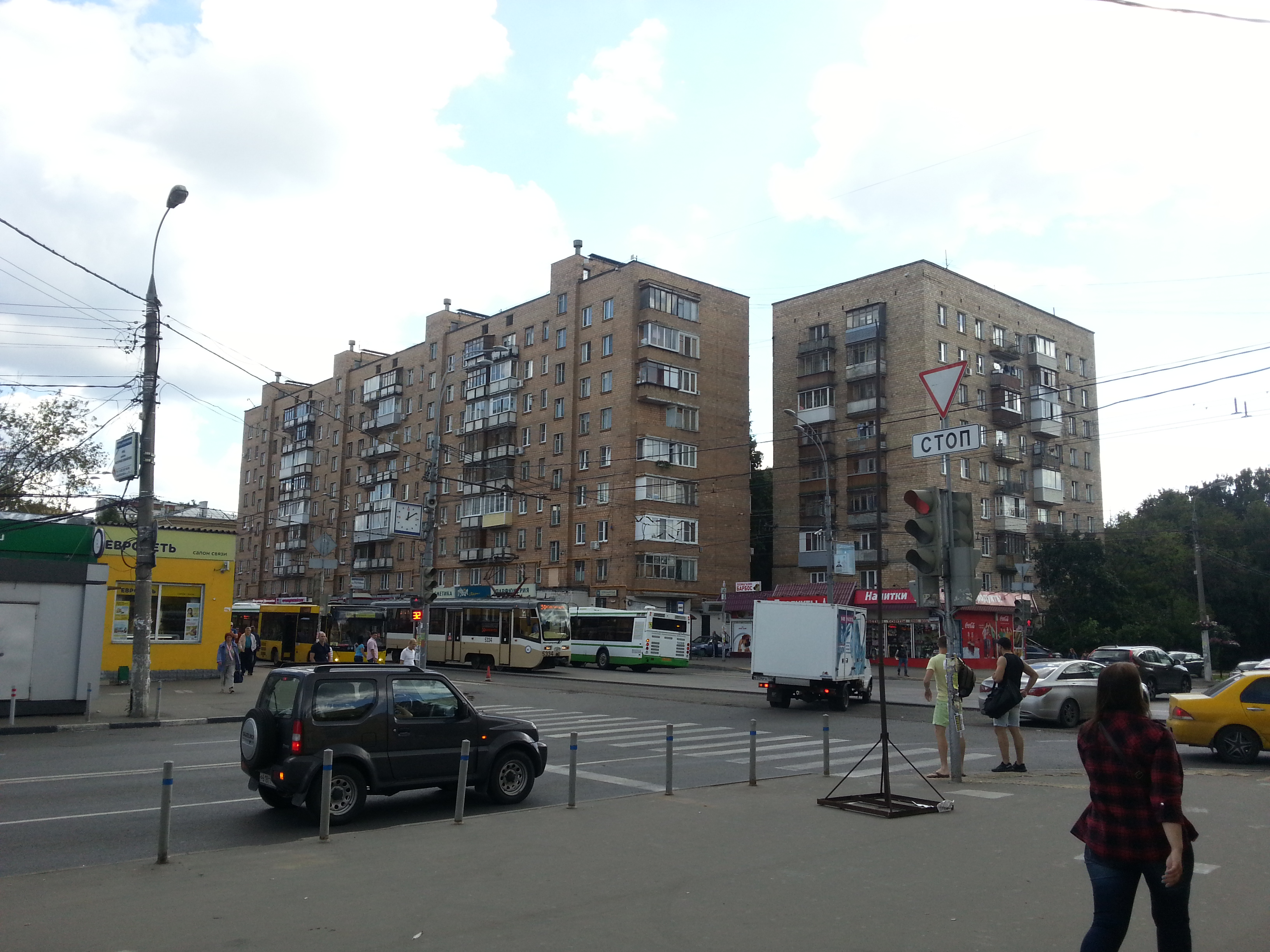 Первомайская улица, Москва. 5 августа 2015г.